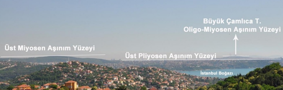 İnceleme sahasındaki aşınım yüzeyleri (İstanbul’un Anadolu Yakasının Jeomorfolojik Özelliklerinin Ana Çizgileri - Yrd. Doç. Dr. Emre Özşahin&Prof. Dr. Deniz Ekinci)